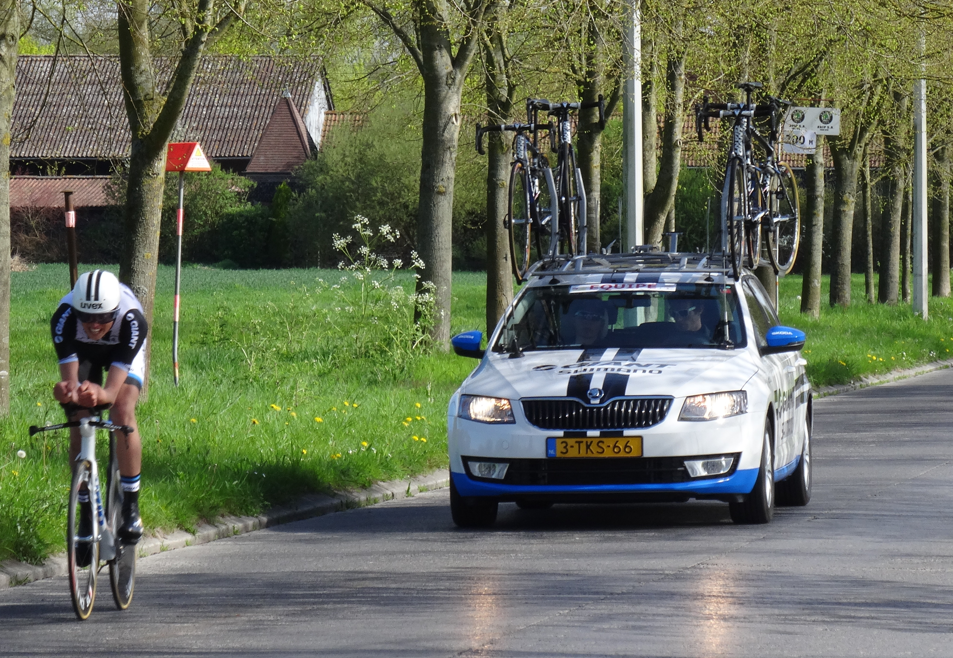 Triptyque des Monts et Châteaux 2014, étape 2a, 5 avril 2014, contre-la-montre individuel à Bernissart. Depicted person: Fredrik Ludvigsson Depicted team: Giant-Shimano Development The creation of these files was made possible thanks to the organizers of the Triptyque des Monts et Châteaux 2014 English | français | +/−